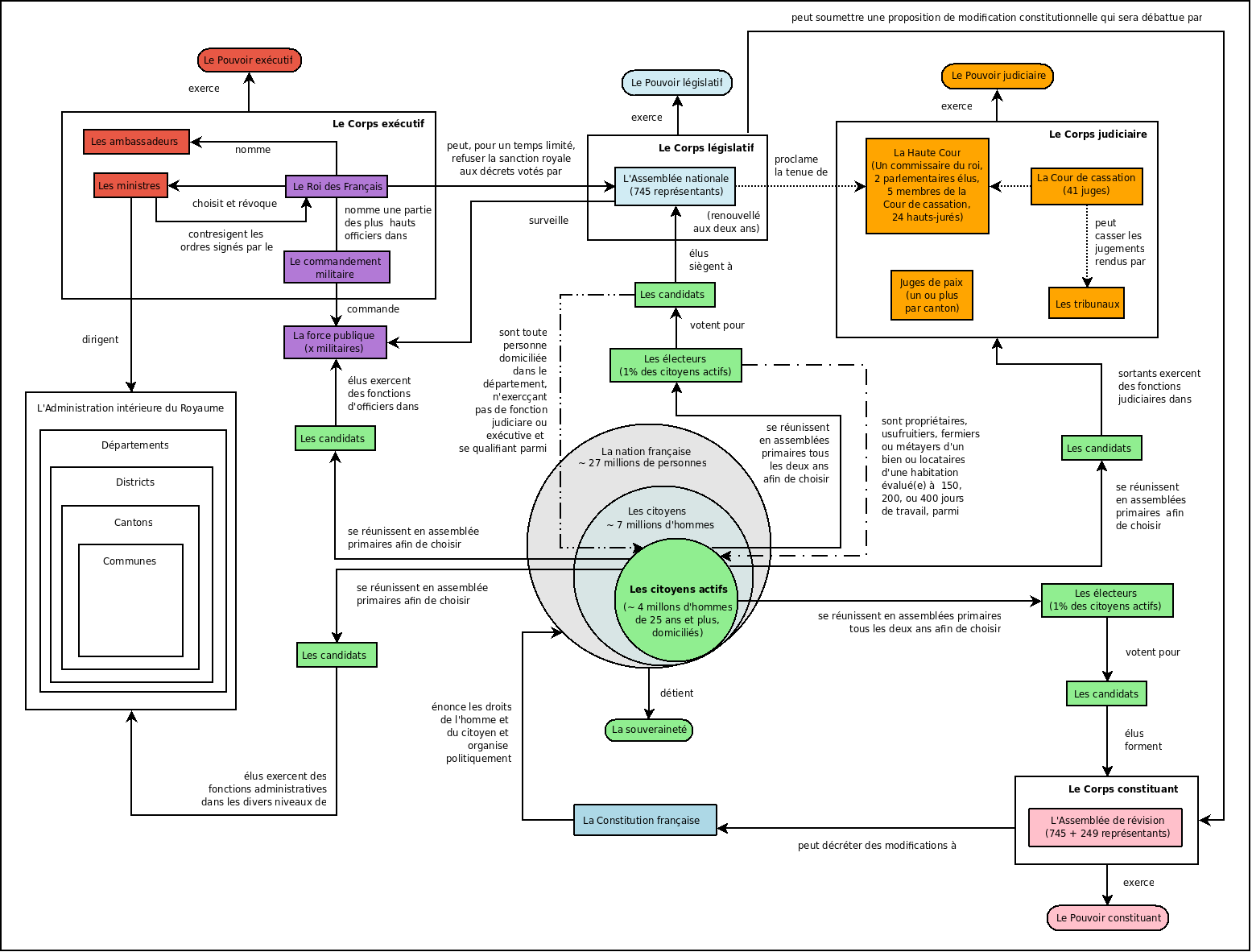 Constitution française du 4 septembre, 1791